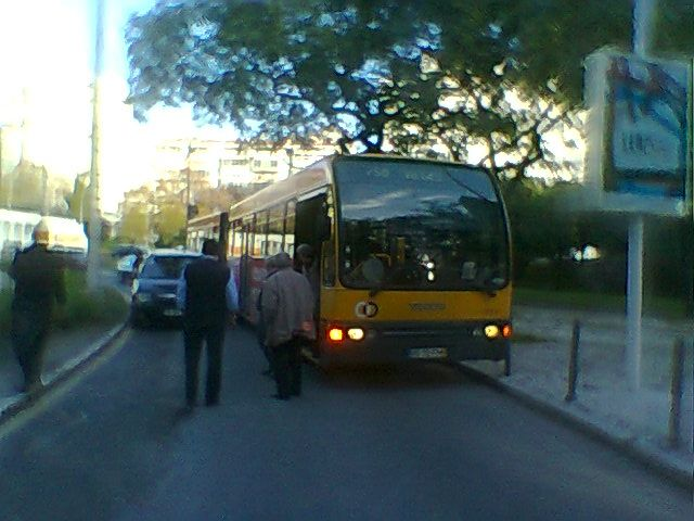 Veículo ligeiro mal estacionado mesmo à saída da segunda circular, sobre traço amarelo contínuo na berma e a seguir a três (!) sinais de paragem proibida seguidos, impedindo a passagem a pesado de passageiros.